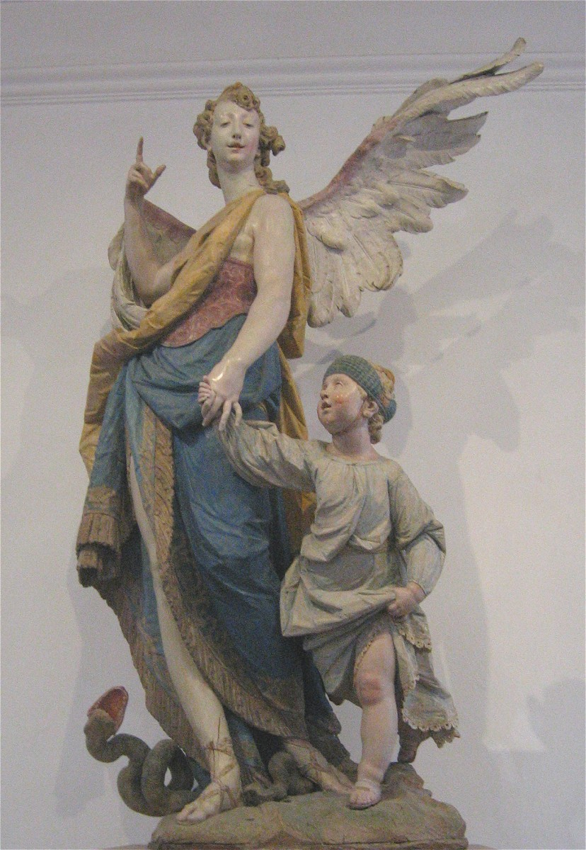 Ignaz Guenther, Schutzengel, im Bürgersaal in München